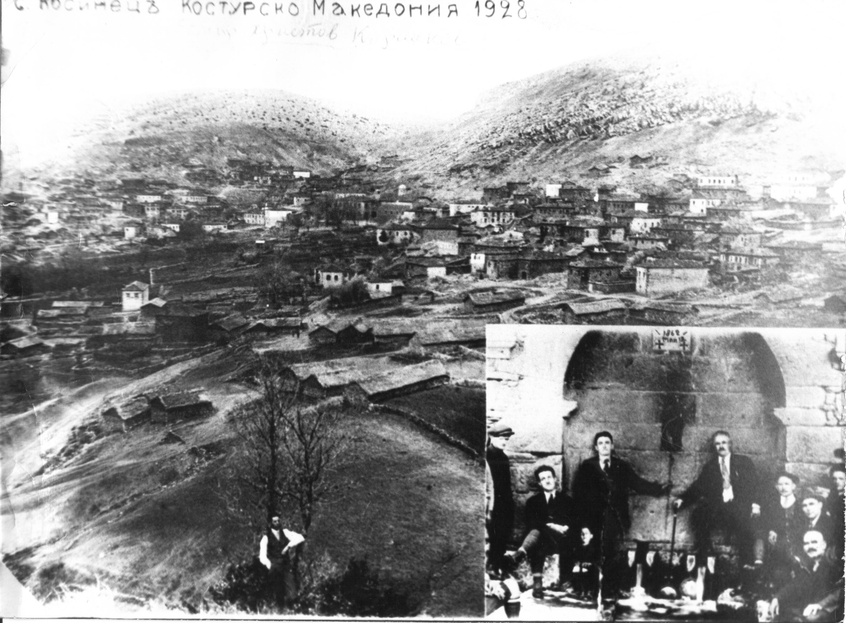 Единствена снимка на селото, преди разрушаването му от гърците окупатоpи през 1930 г.